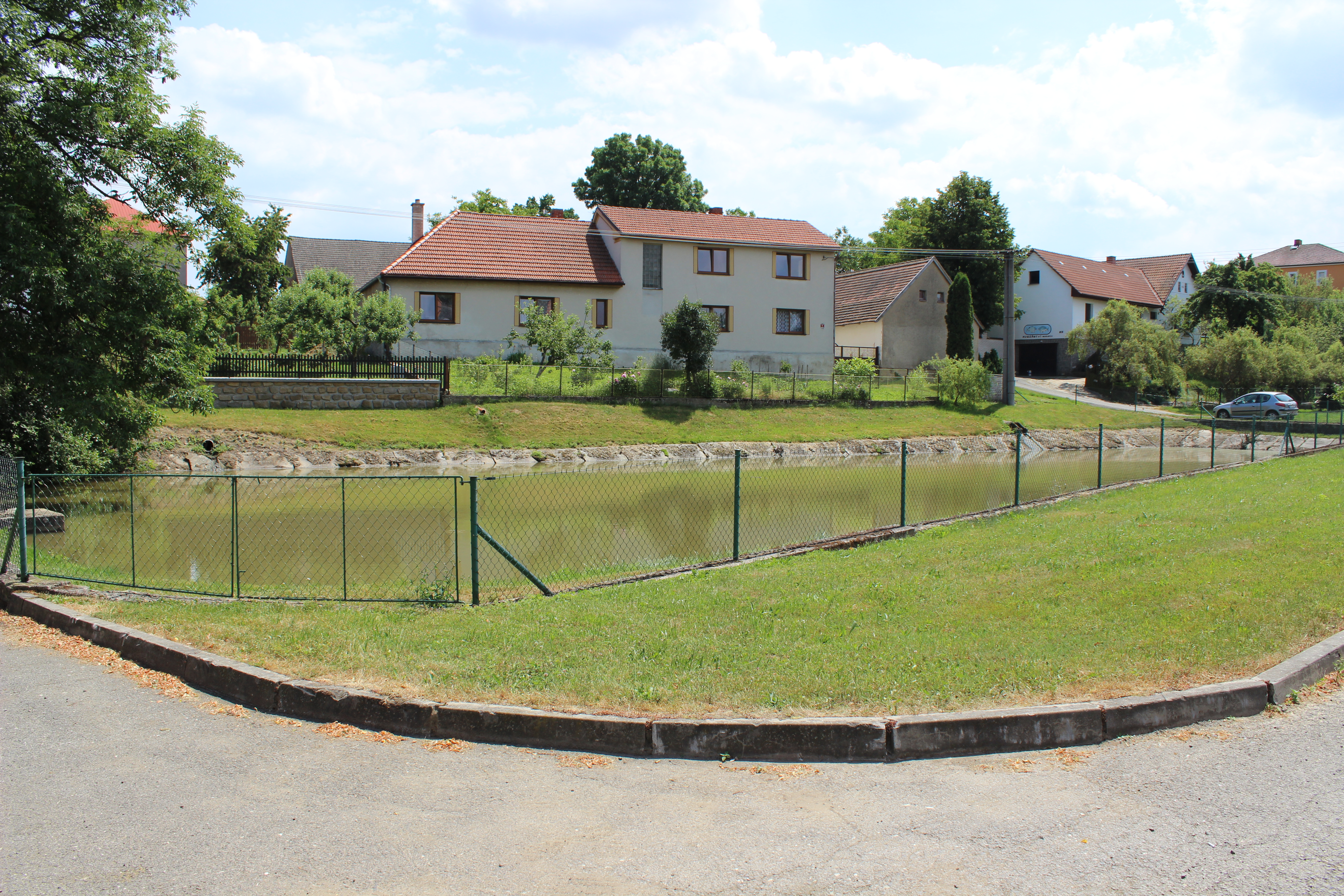 Nádrž u návsi v Lokti. V pozadí dům číslo popisné 9.